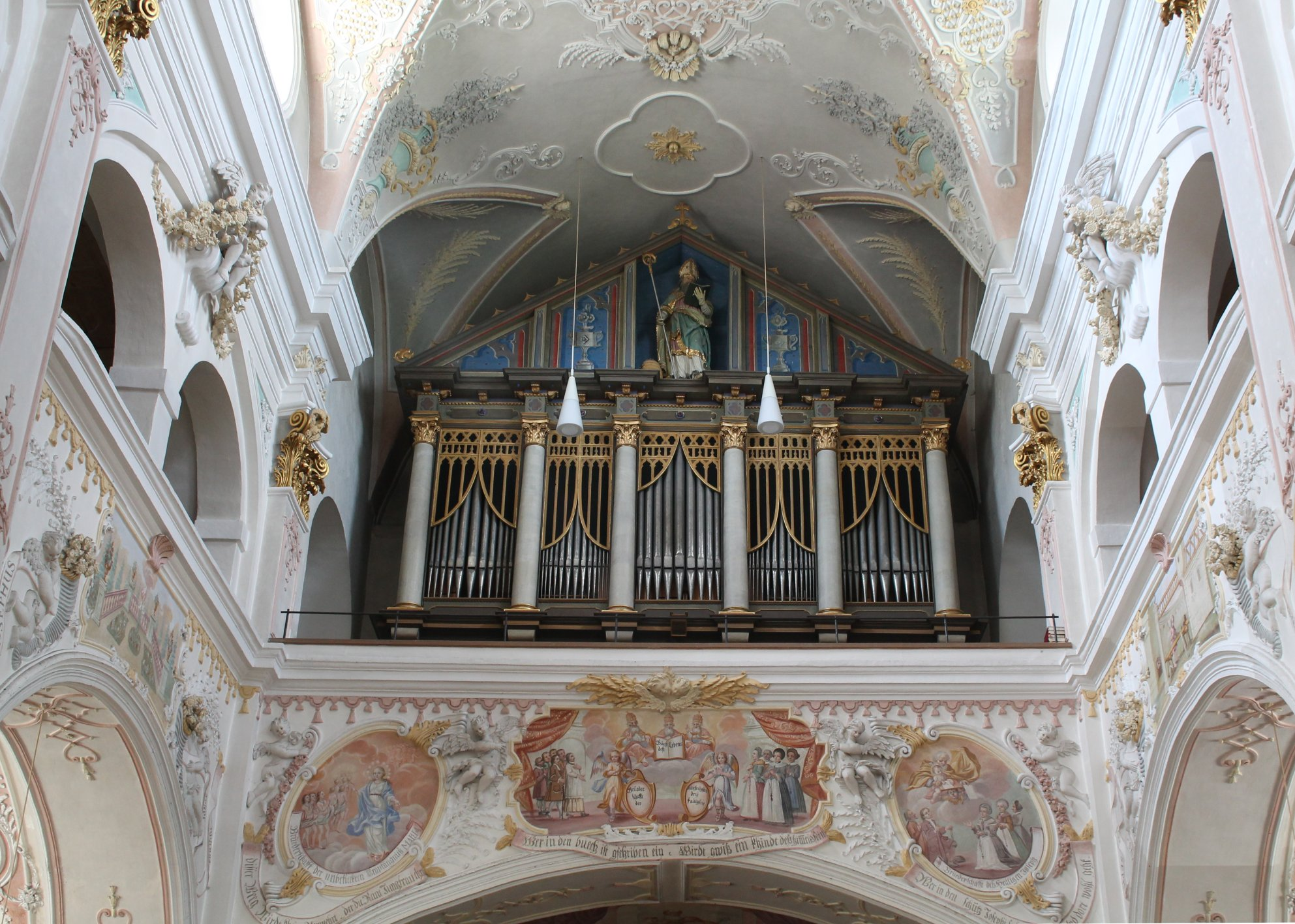 Orgel der Wallfahrtskirche Weihenlinden (1974, Anton Staller, II/17; mit Barockbestand um 1685) This is a photograph of an architectural monument.